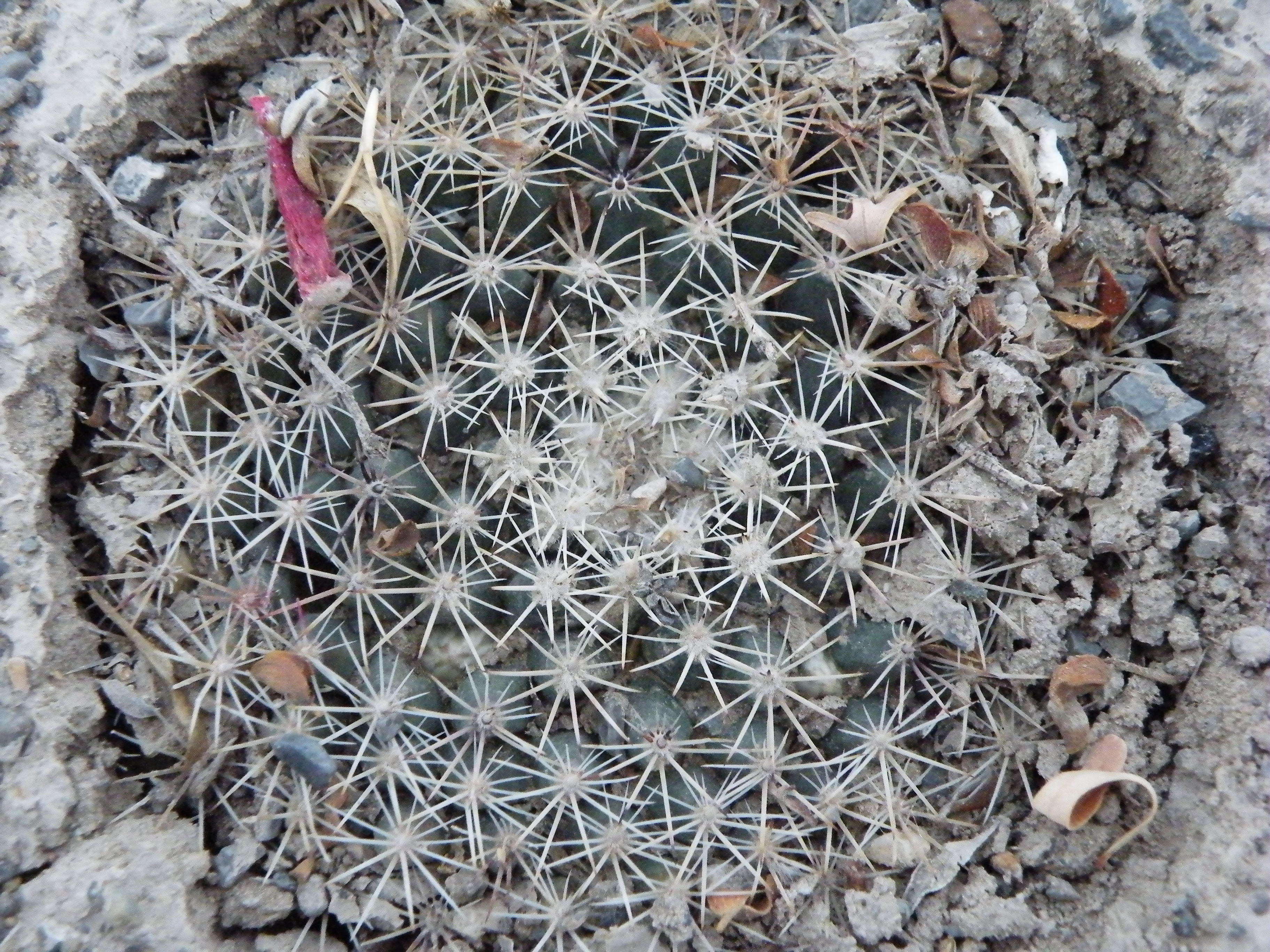 Estacion marte, Coahuila